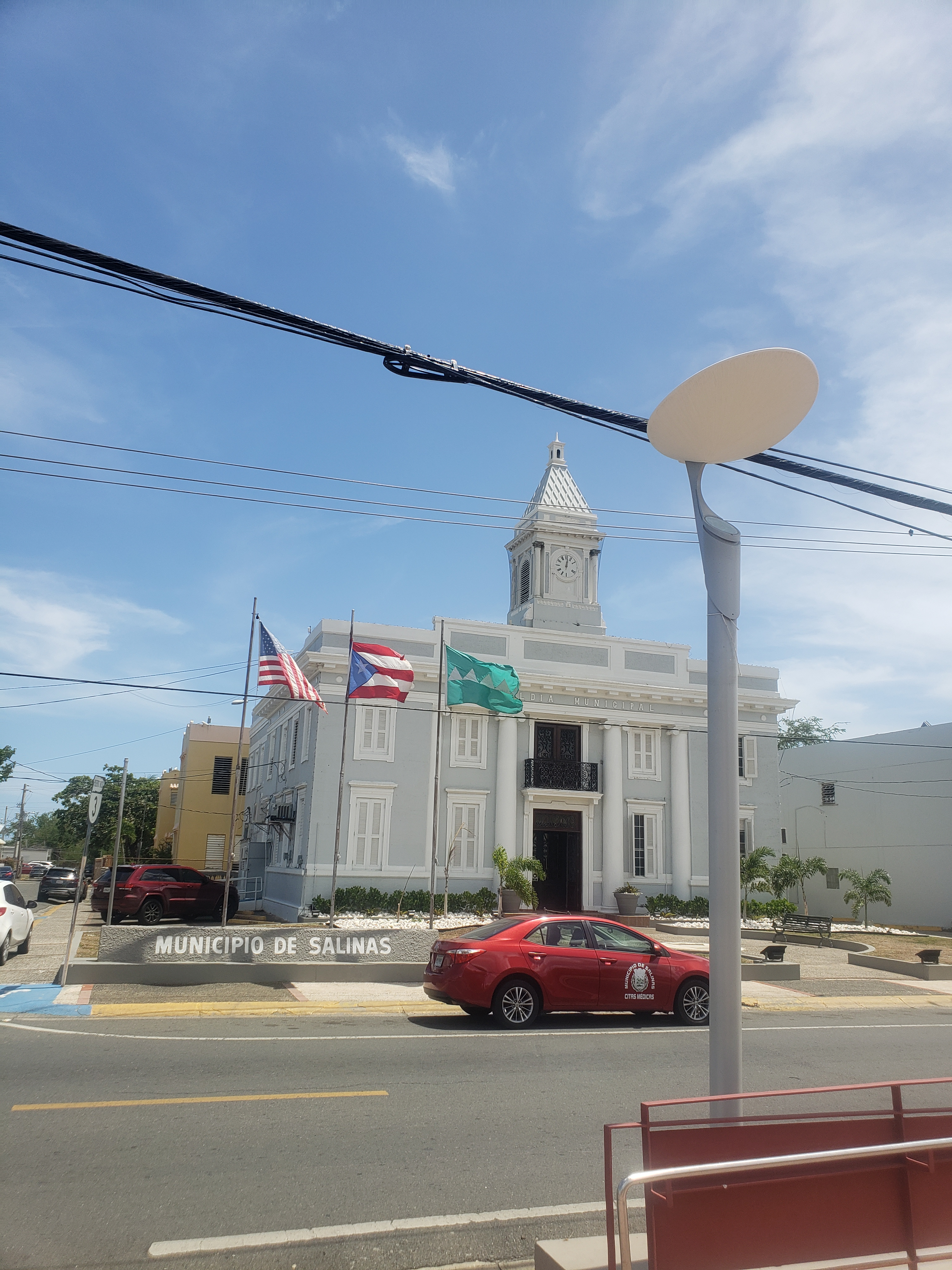 Alcaldía del Municipio de Salinas, Puerto Rico